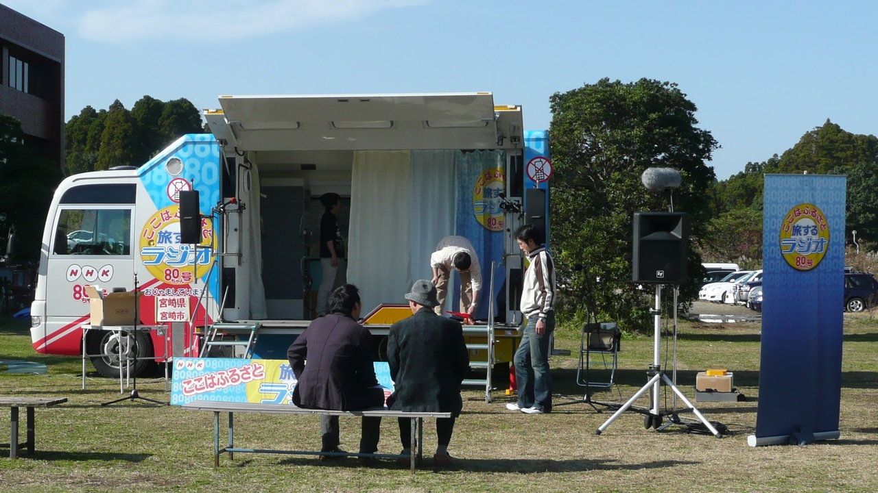 NHKのラジオ中継車「80ちゃん号」をオープンスタジオ化した様子。宮崎大学木花キャンパス内で撮影。